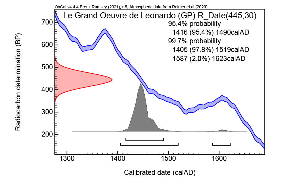 Datation par le radiocarbone (C14) du Grand Œuvre de Leonardo : Courbe et data (Oxcal v4.1 Christopher Bronk Ramsey 2010) d'après les résultats d'analyse du CDRC de Lyon